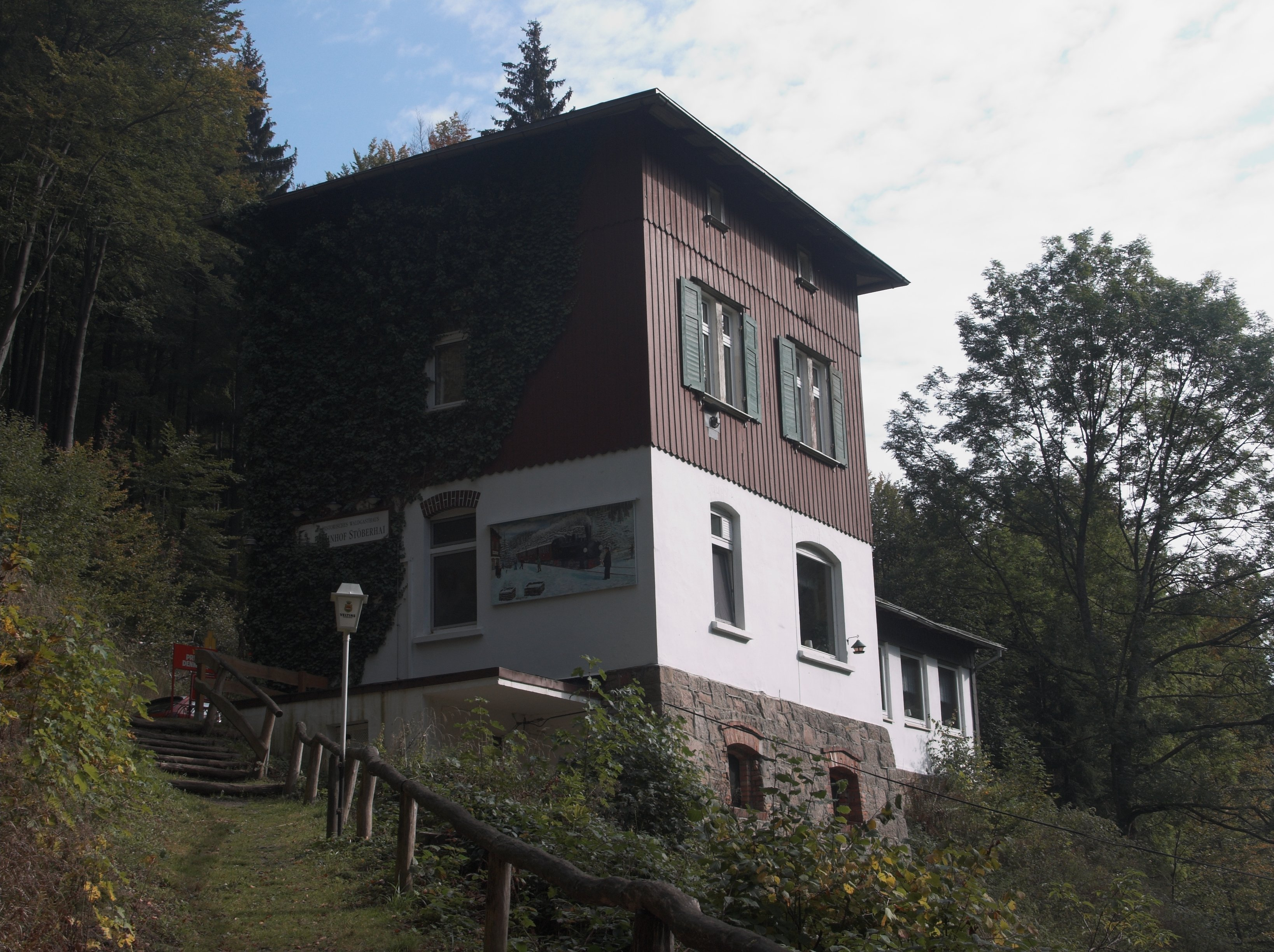 Bahnhof Stöberhai im Weinglastal bei Wieda